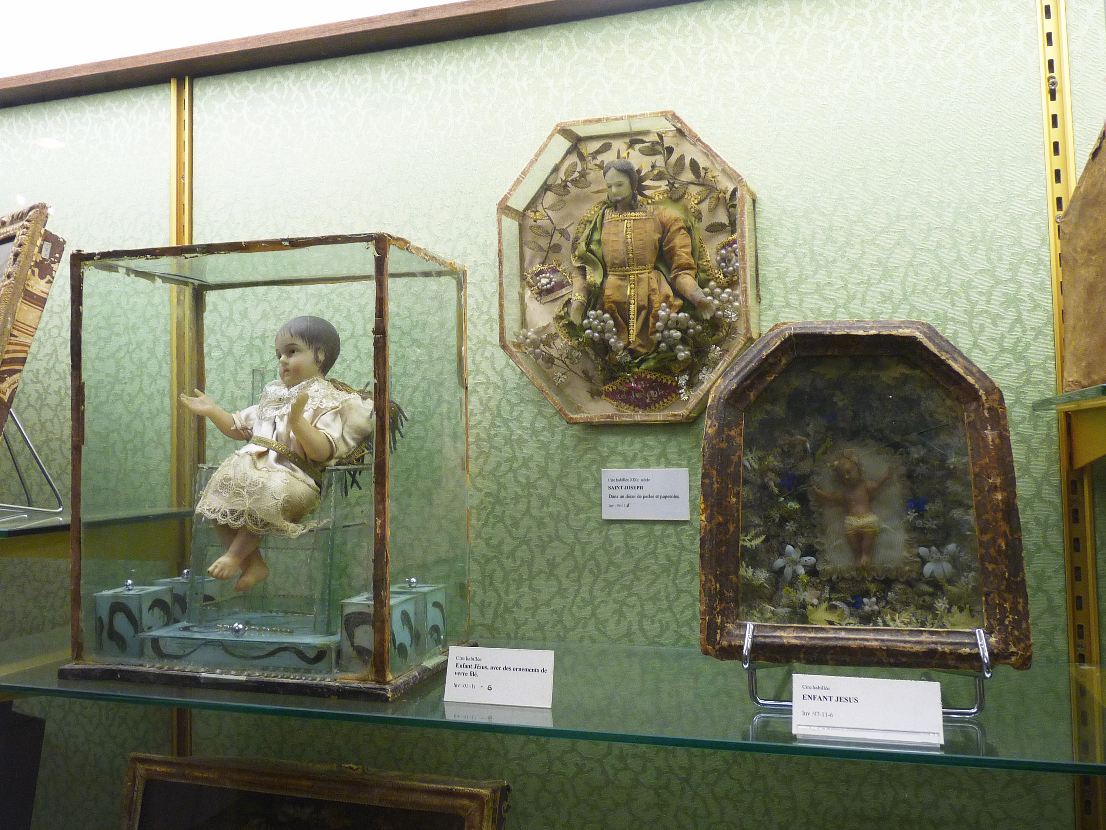 Trois cires habillées au Musée Charles de Bruyères de Remiremont. Deux représentations de l'Enfant Jésus et Saint Joseph au centre )